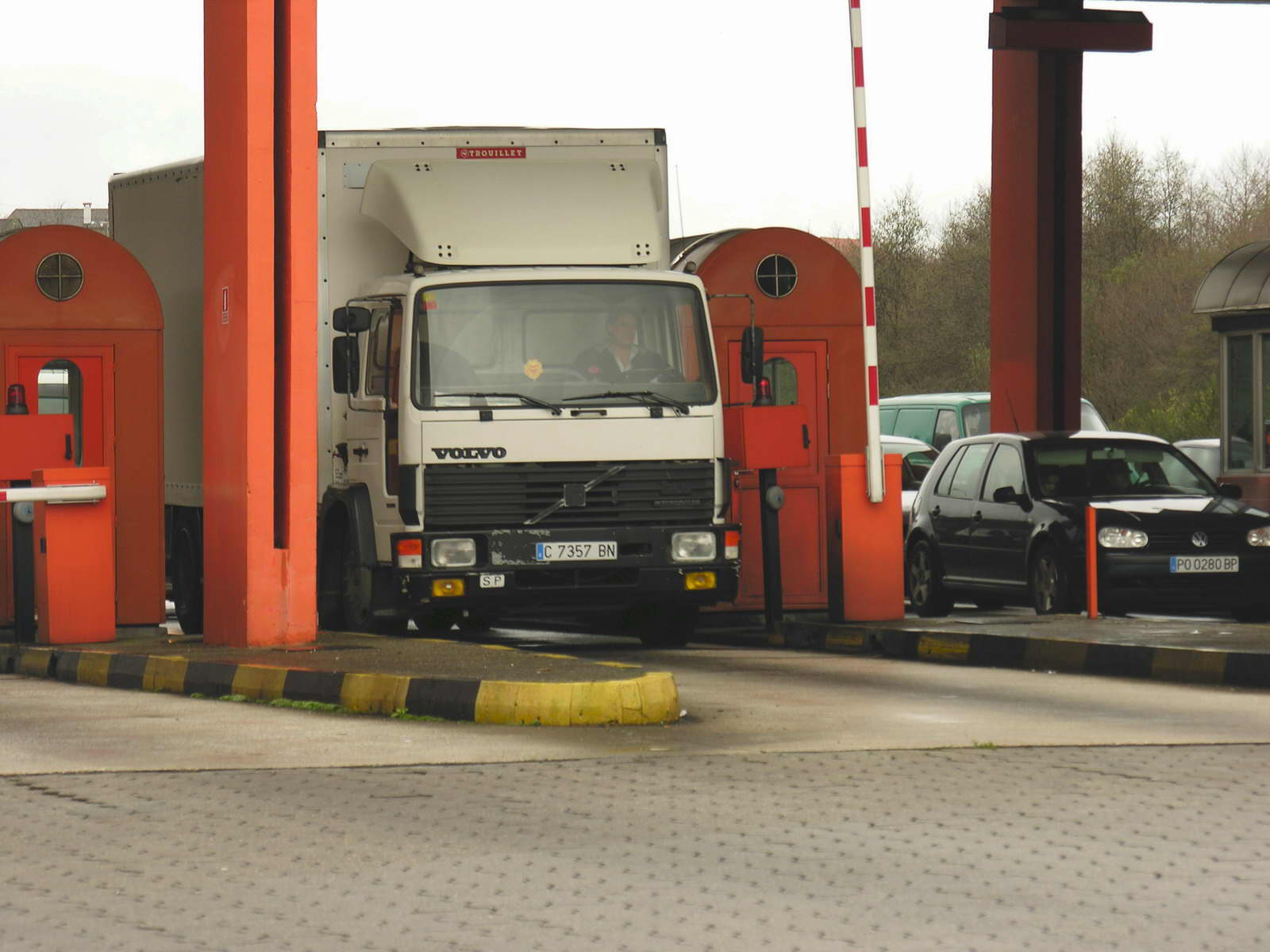 self made .Galicia - Spain.